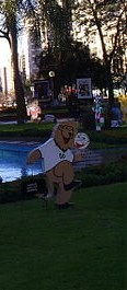 Goleo VI, mascota de la Copa Mundial de Fútbol de 2006